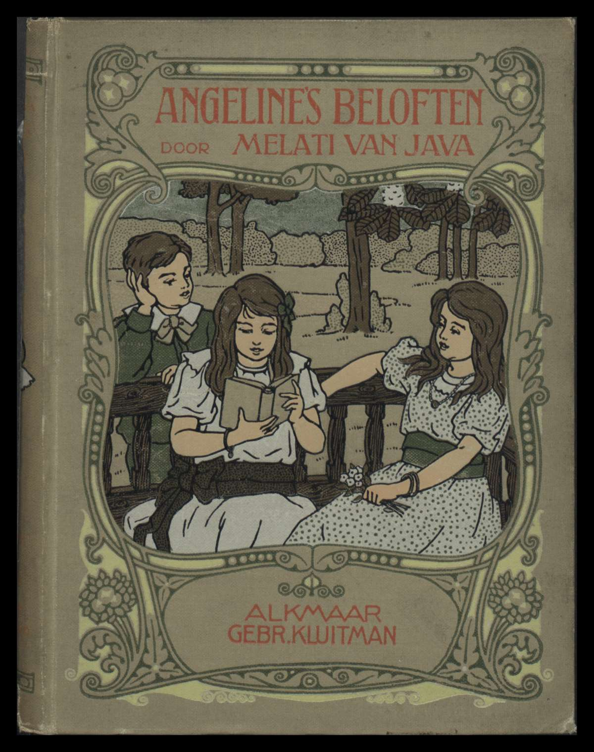 Boekomslag: Angeline's beloften. Eerste uitgave 1911. Auteur: Melai van Java (1853 – 1927). Bandontwerp: L.W.R. Wenckebach. Uitgeverij: Gebr. Kluitman's Boek- en Kunstdrukkerij